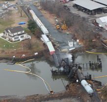 paulsboro_aerialIMG_0441